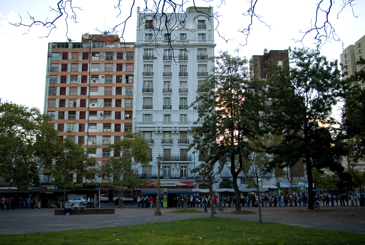 Constitución Square, Buenos Aires.